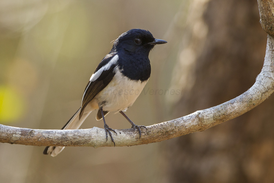 Madagascar Magpie-Robin - Ankarafantsika - Madagascar_S4E9687